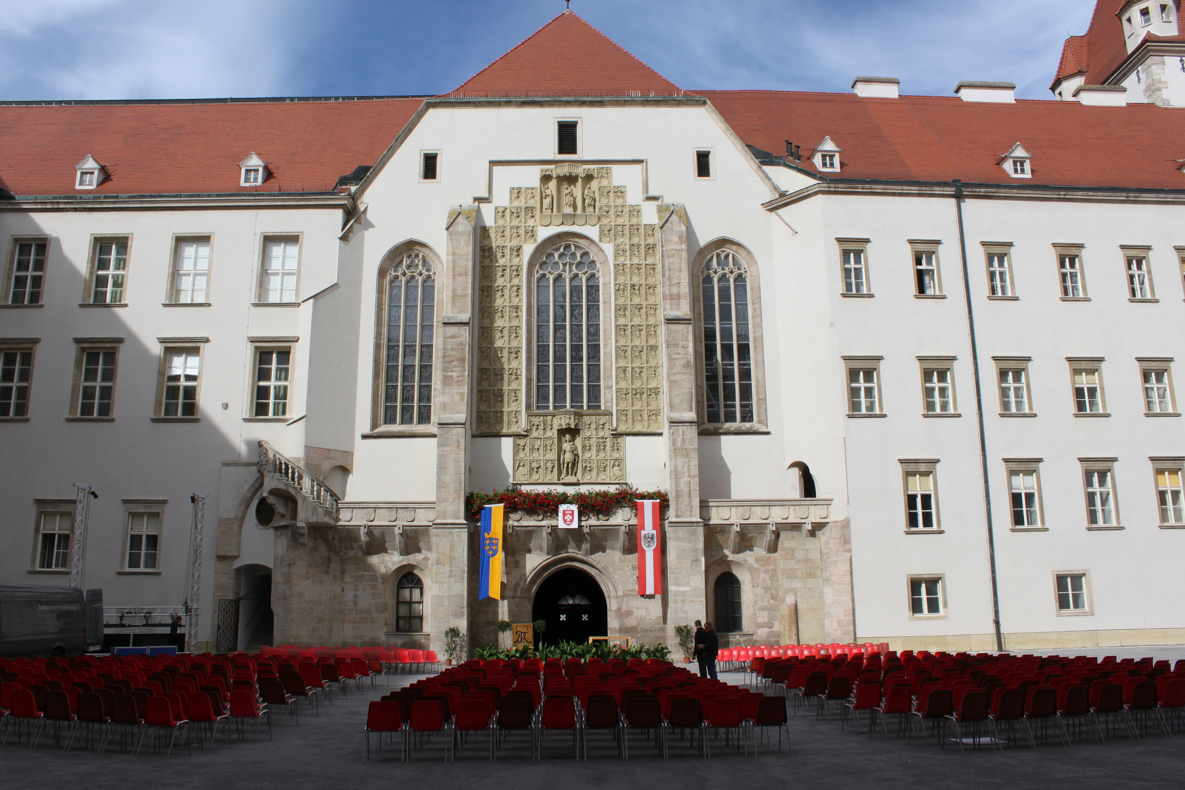 Georgskapelle, Wappenwand Burg Wiener Neustadt, Bestuhlung für die Ausmusterung der Theresianischen Militärakamedie